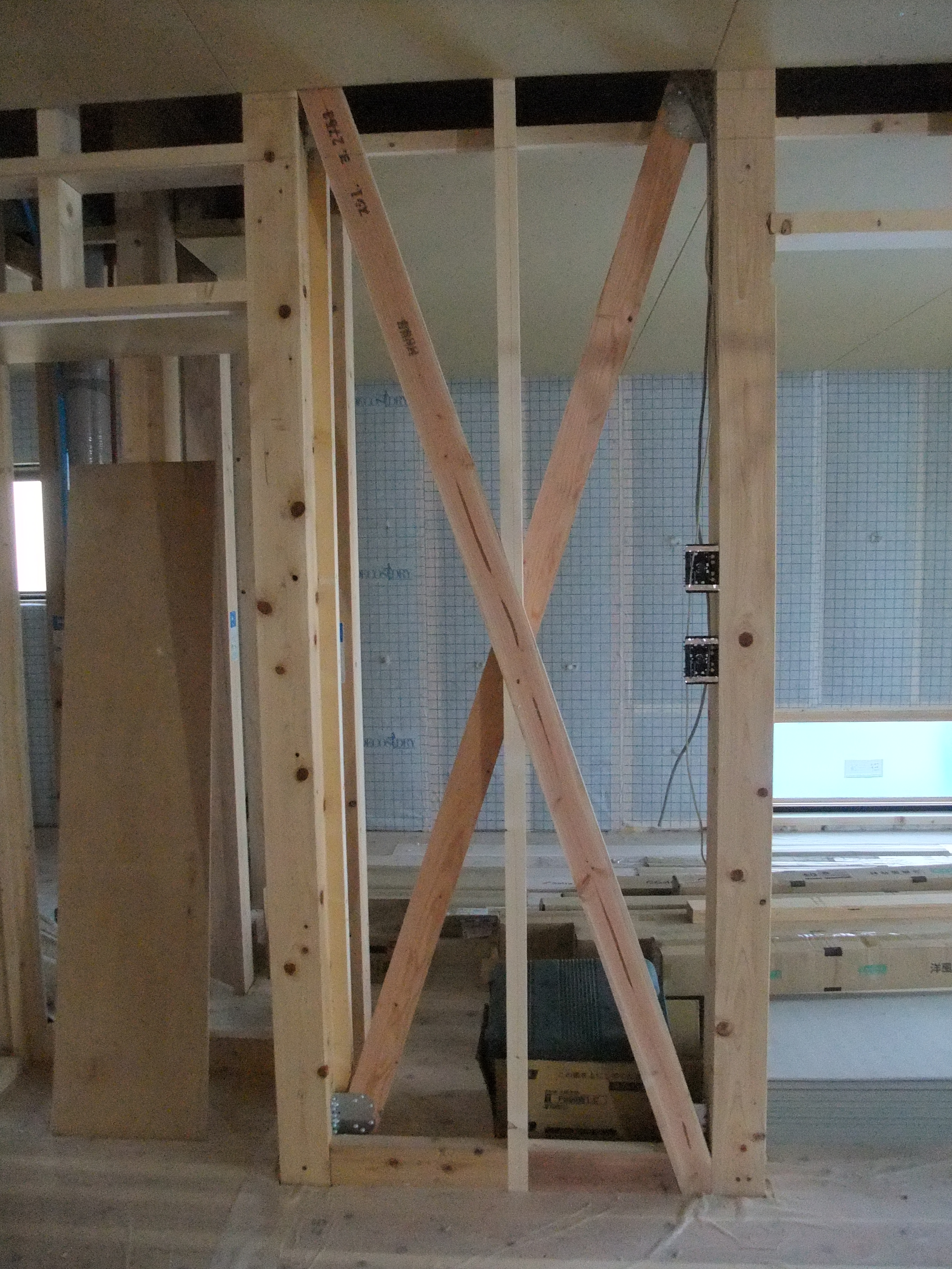 筋交い。柱は檜。床の構造用面材はトライウッドパネル